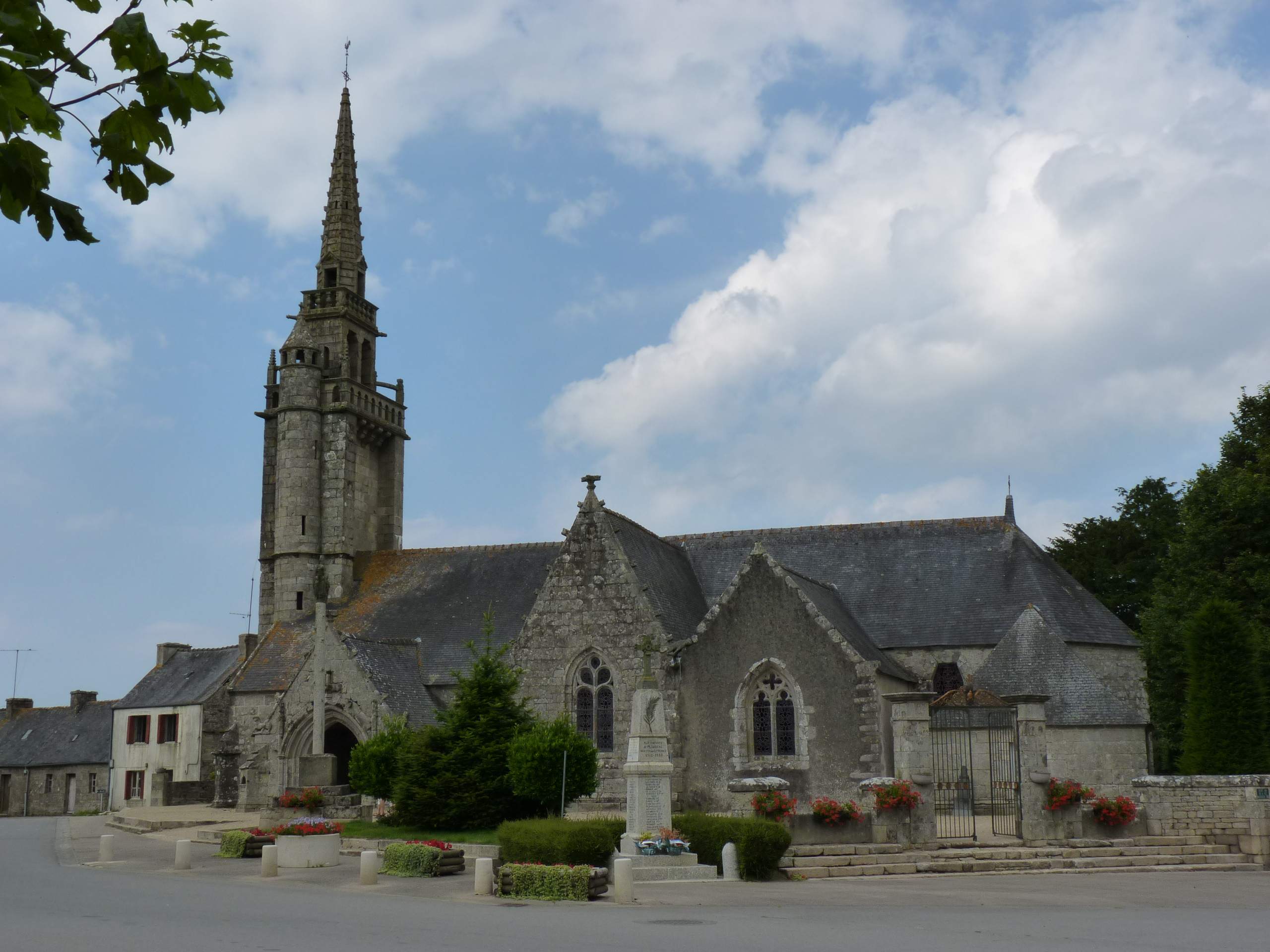 Eglise du 16ème siècle